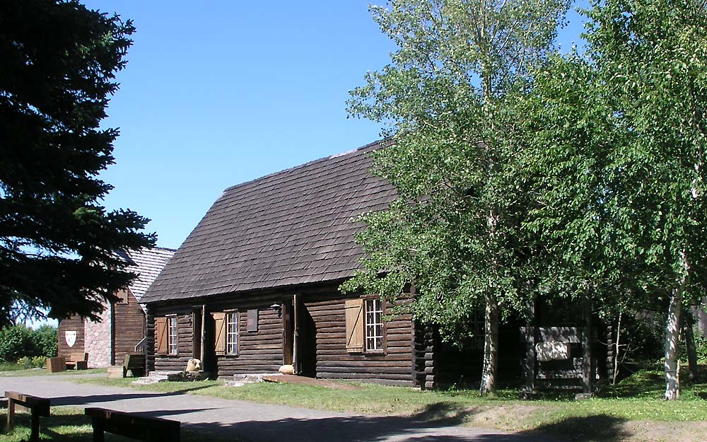 Reconstitution à Uashat (près de Sept-Îles) d’un poste de traite de la Compagnie de la Baie d'Hudson d’après des fouilles archéologiques.